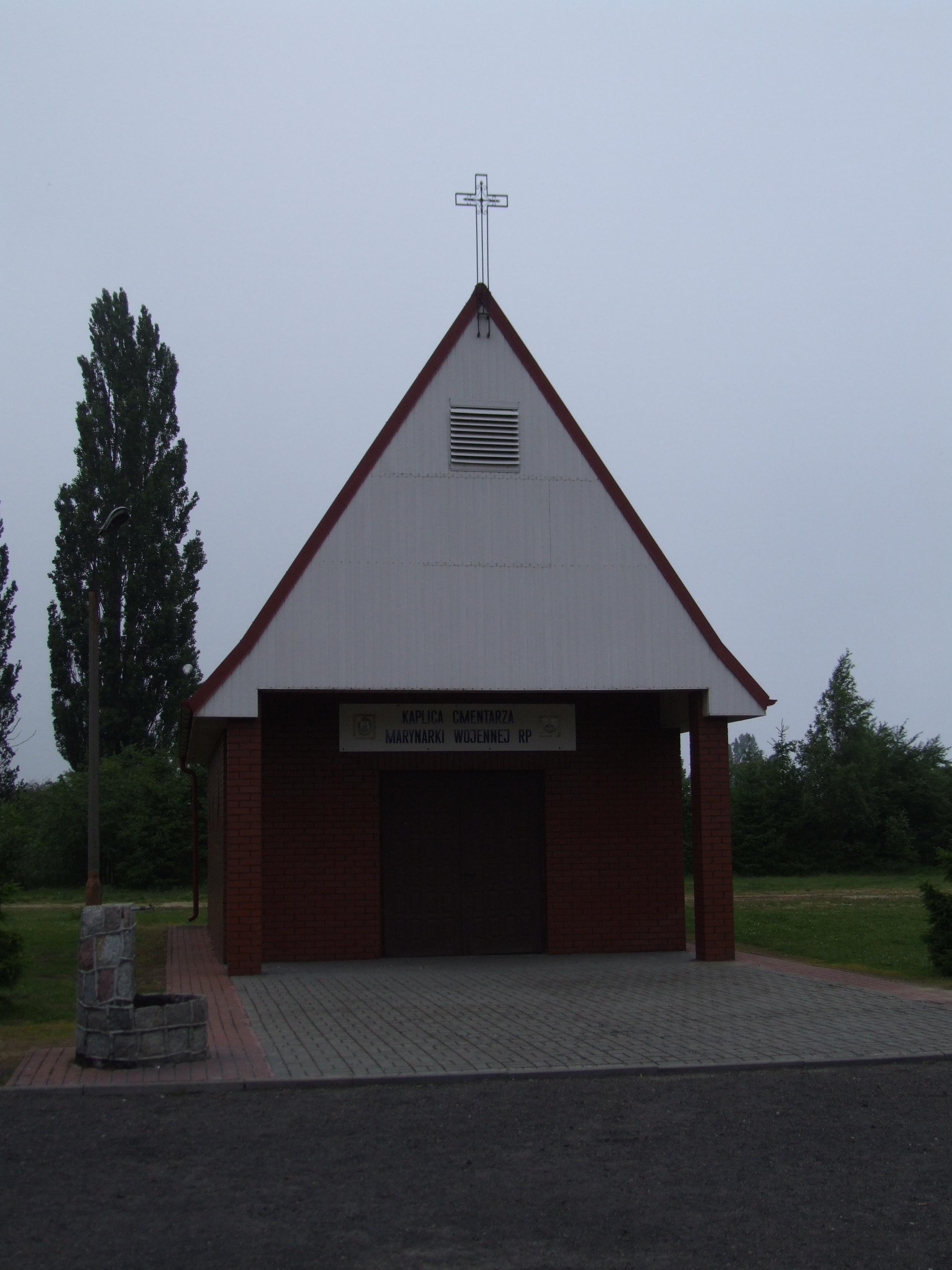 Gdynia-Oksywie Cmentarz Marynarki Wojennej